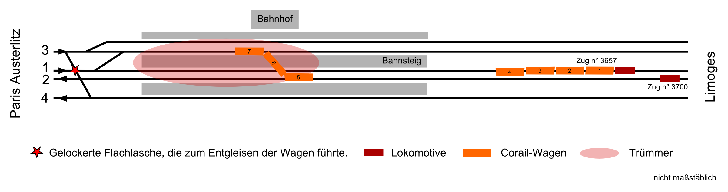 Skizze des Eisenbahnunfalls von Brétigny-sur-Orge